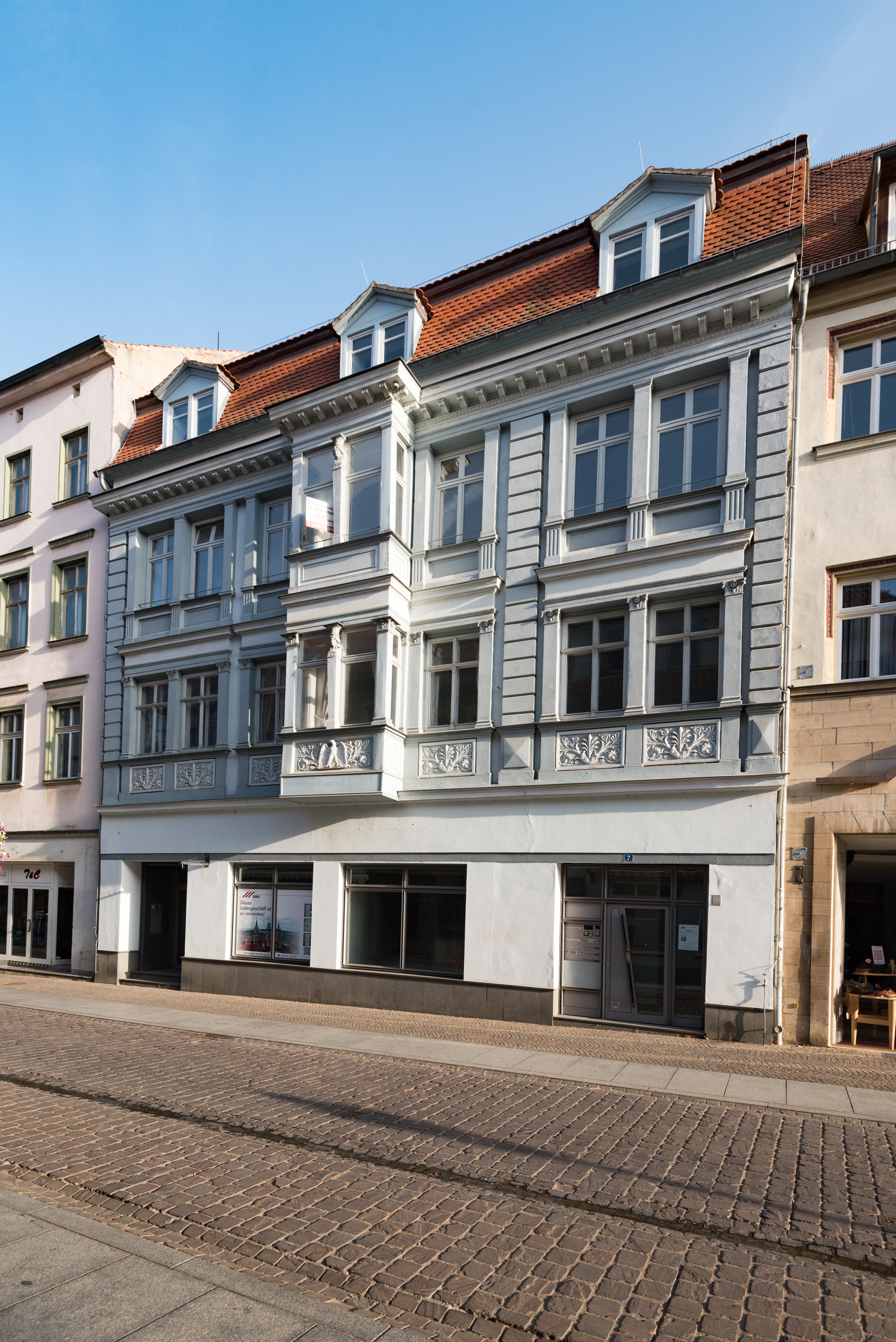 Naumburg (Saale), Jakobstraße 7